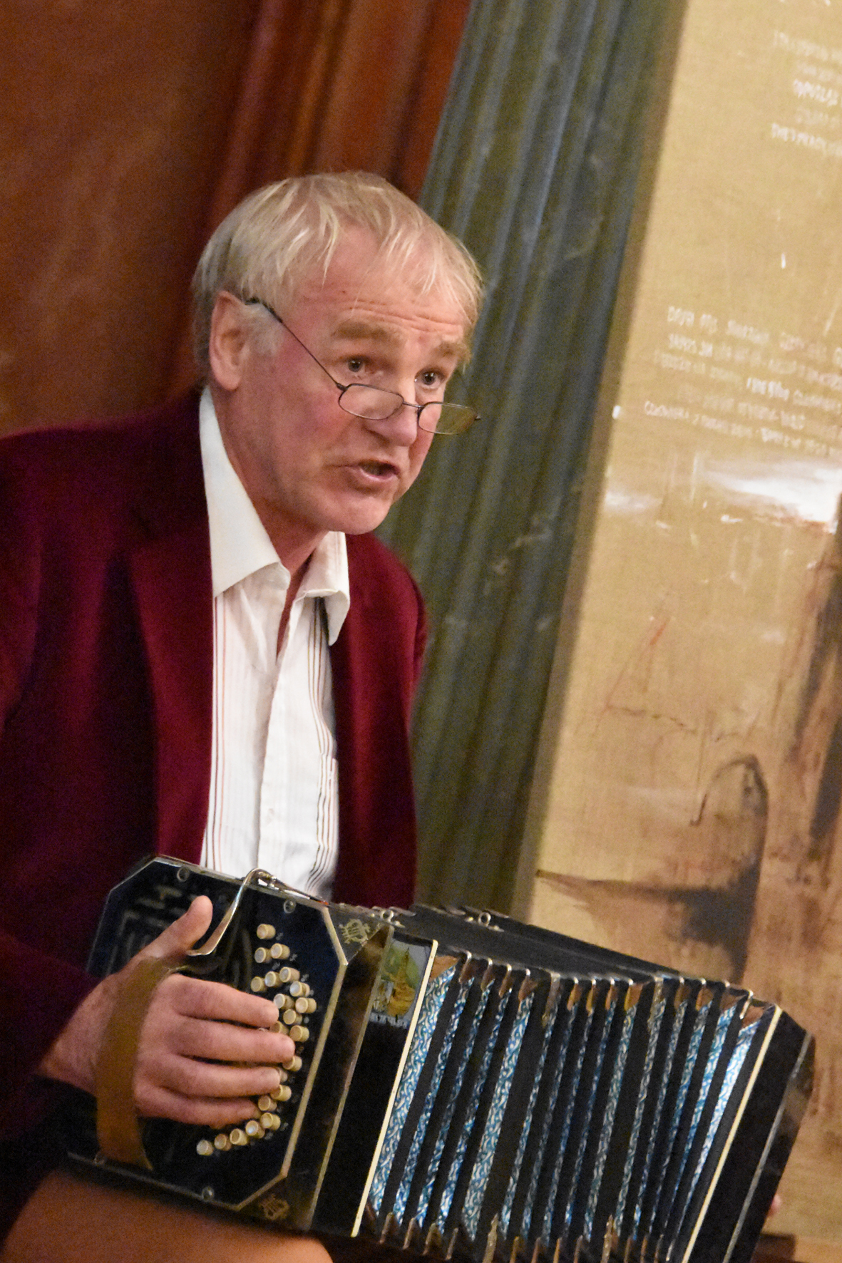 Der Liedermacher Dieter Kalka mit Bandoneon in Poznan, 2018.